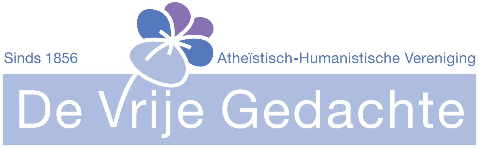 Het logo van De Vrije Gedachte